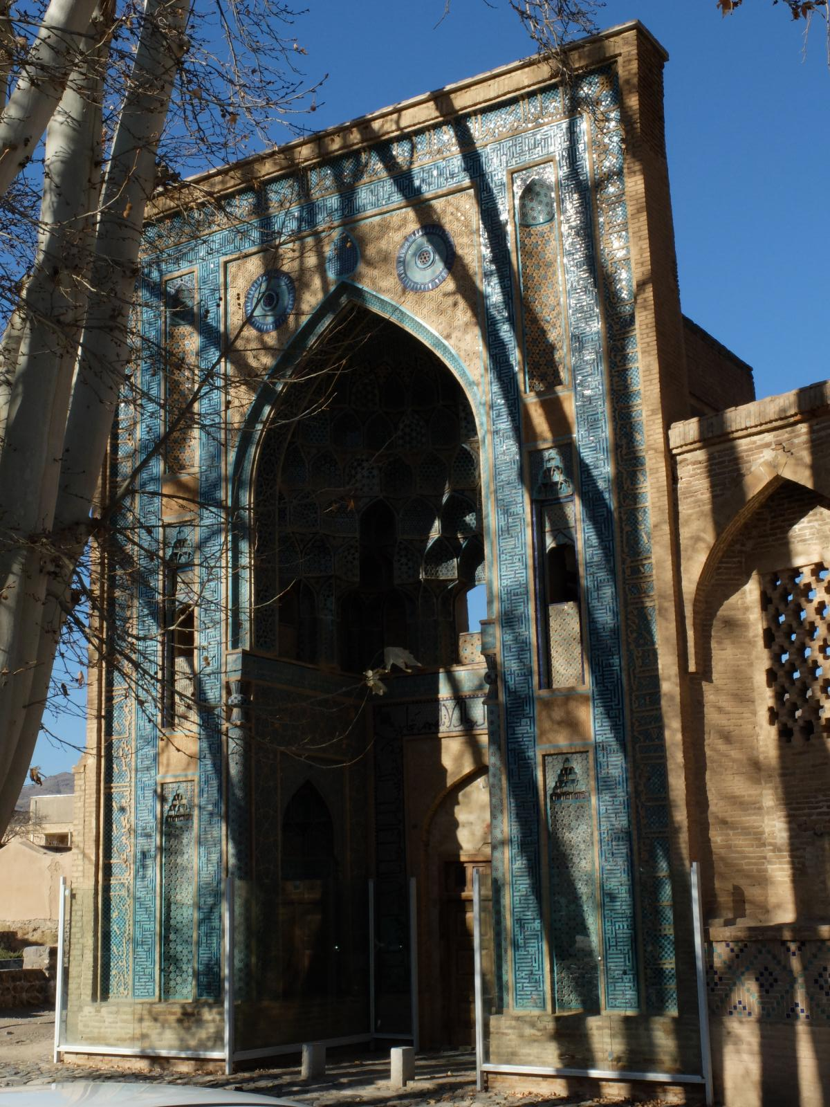 in Natanz - Masjed-e Jameh